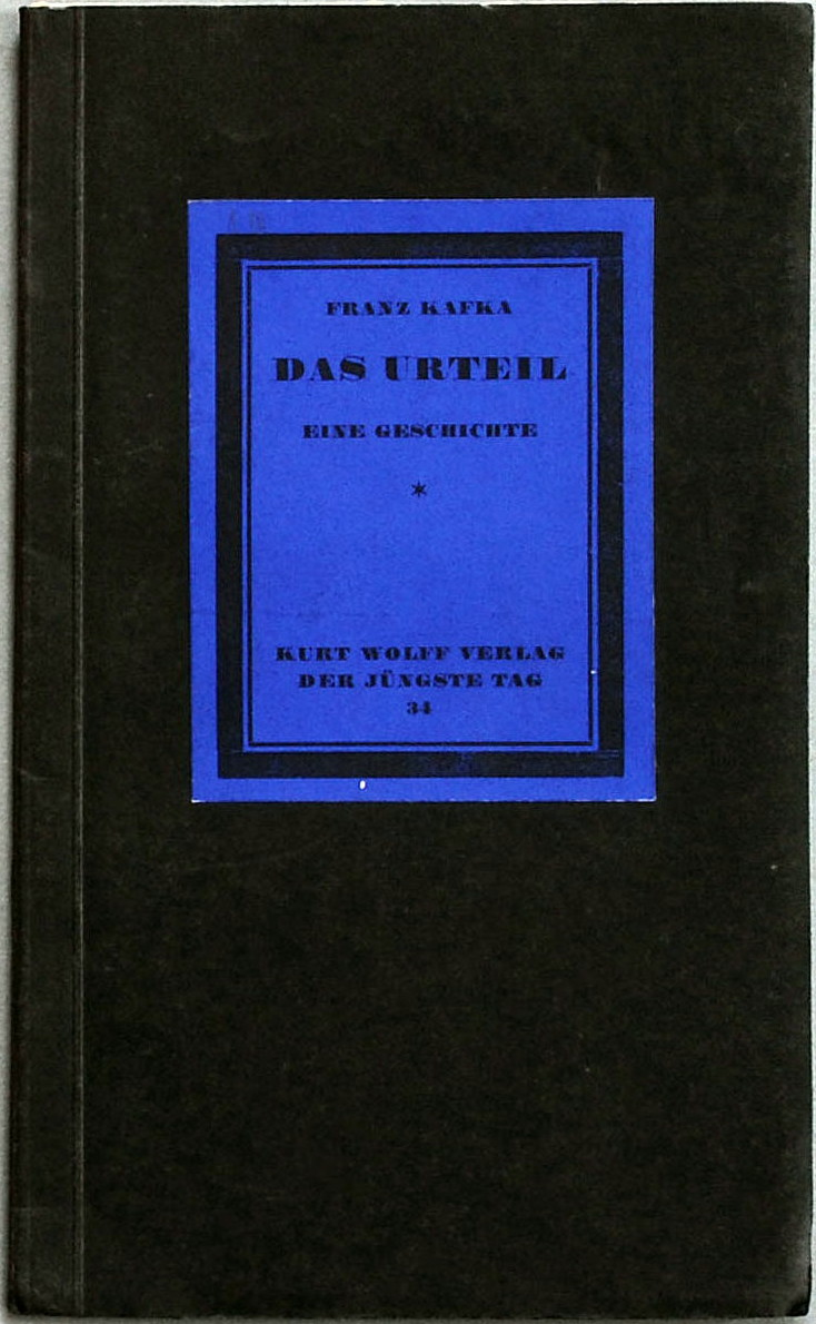 Franz Kafka: Das Urteil. Eine Geschichte. Leipzig: K. Wolff 1916, Der jüngste Tag Band 24. 28 Seiten + 1 nicht paginierte Seite Text + 1 Blatt Verlagsanzeigen. Erstausgabe (Dietz 31).